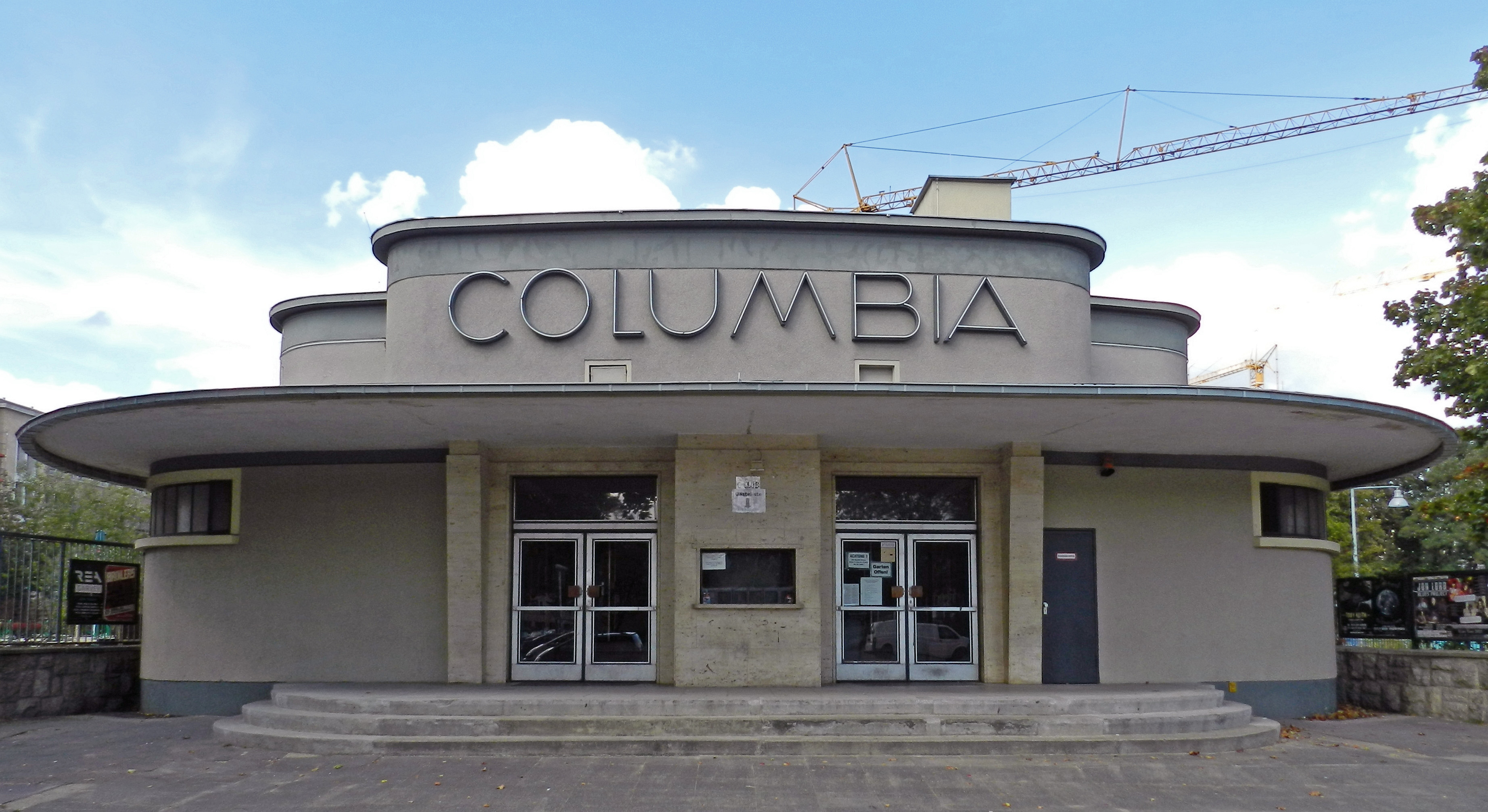 Ehemaliges Columbia-Kino der amerikanischen Aliierten in Berlin.